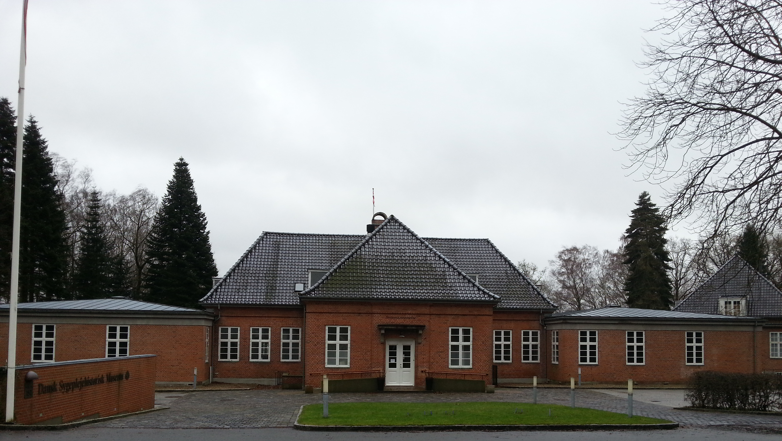 Indgangen til Dansk Sygeplejehistorisk Museum